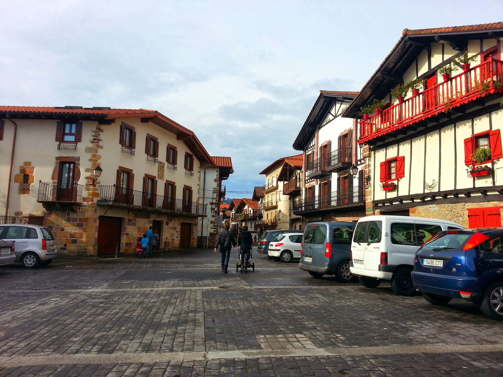 Centre-bourg de Bera, Navarre